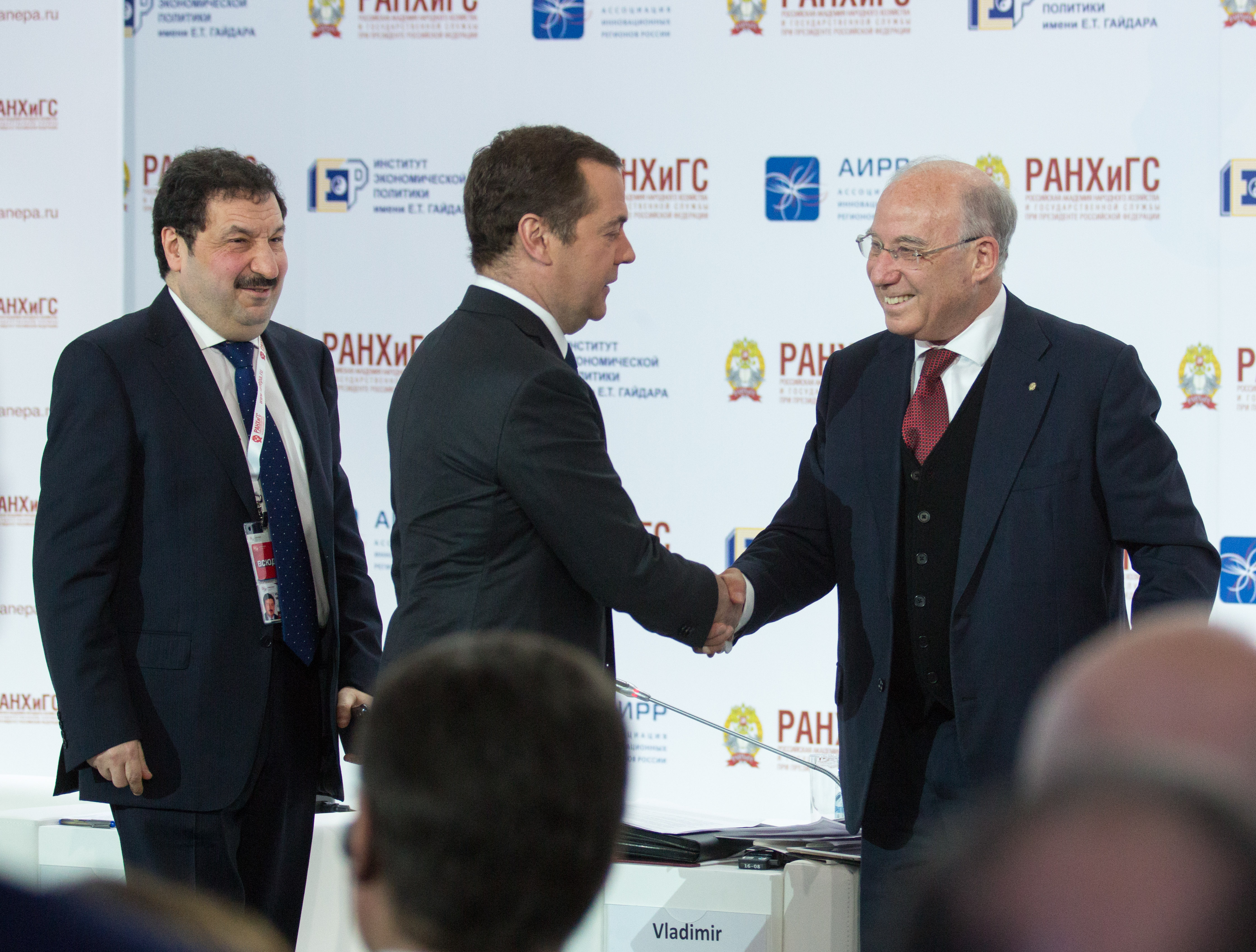 В пленарной дискуссии Гайдаровского форума – 2018 принимали участие: Модератор: Владимир Мау, ректор Российской академии народного хозяйства и государственной службы при Президенте Российской Федерации. Участники: Дмитрий Медведев, Председатель Правительства Российской Федерации; Кристалина Георгиева, главный исполнительный директор Всемирного банка; Иван Крастев, политолог, председатель Правления Центра либеральных стратегий в Софии, научный сотрудник Института гуманитарных наук в Вене; Херман Ван Ромпёй, президент Европейского центра политики, президент Европейского Совета (2009–2014 гг.), премьер-министр Бельгии (2008–2009 гг.); Кай Мюккянен, министр внешней торговли и развития Финляндии; Якоб Френкель, председатель Правления JP Morgan Chase International, председатель Банка Израиля (1991–2000 гг.).